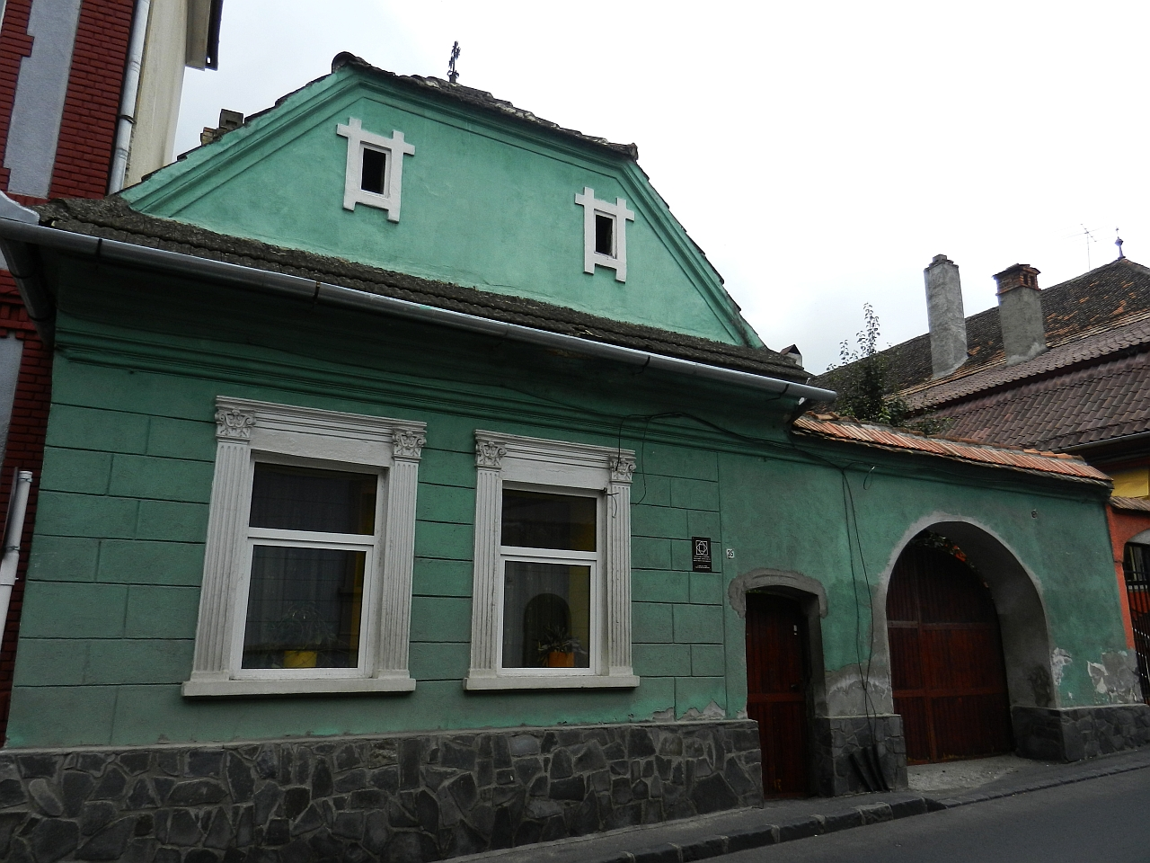 Casă și poartă de lemn